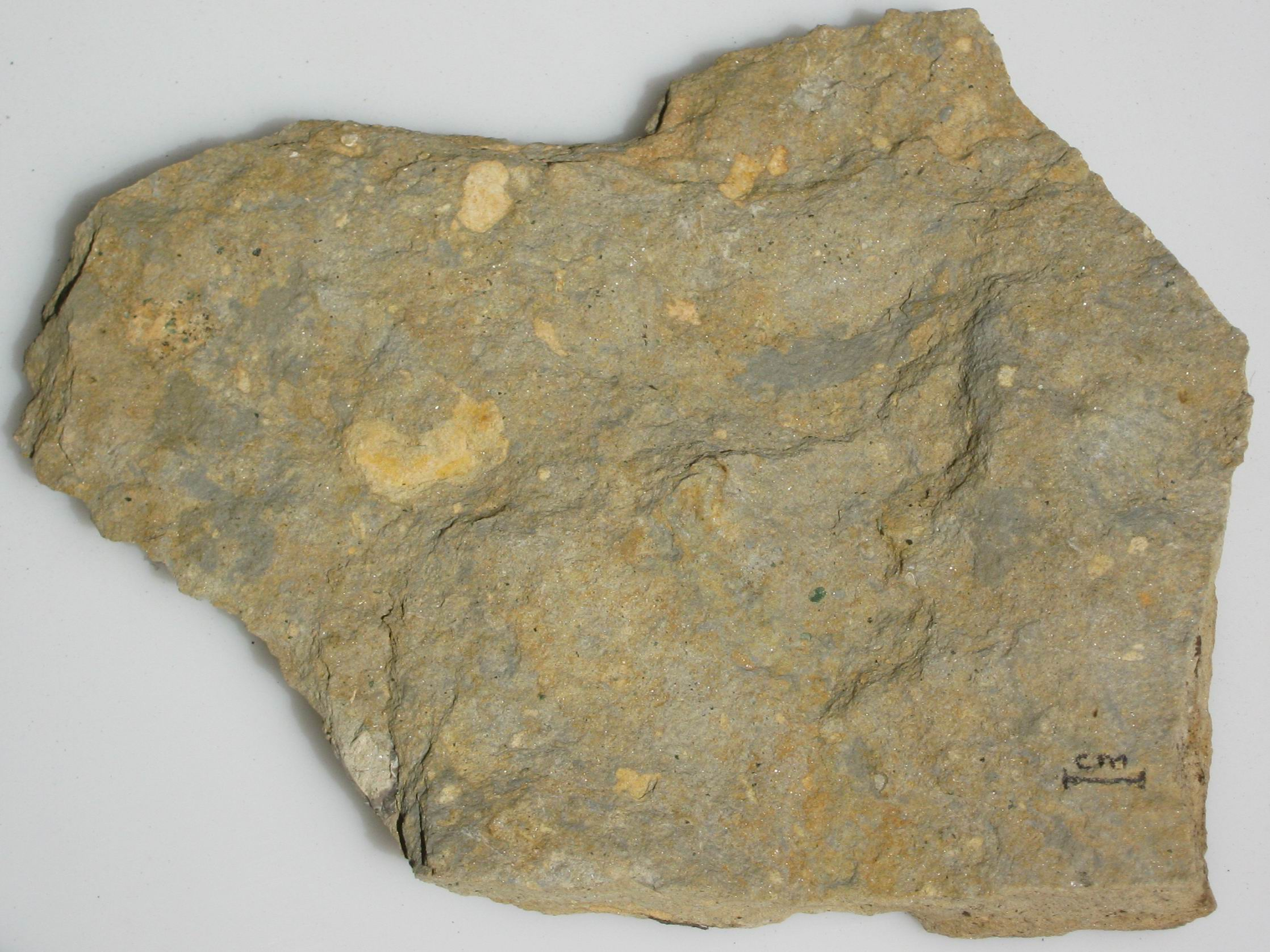 Pläner, Schichtoberfläche mit der typischen Fleckung, Ratssteinbruch Dresden-Dölzschen, Dölzschen-Formation